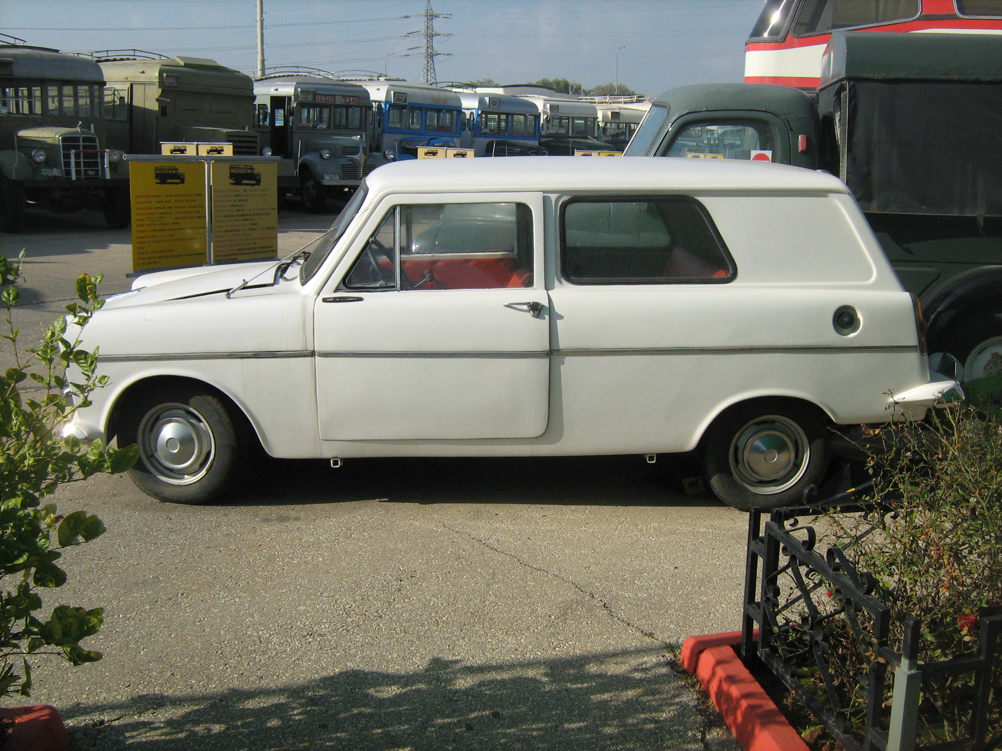 מוזיאון אגד בחולון